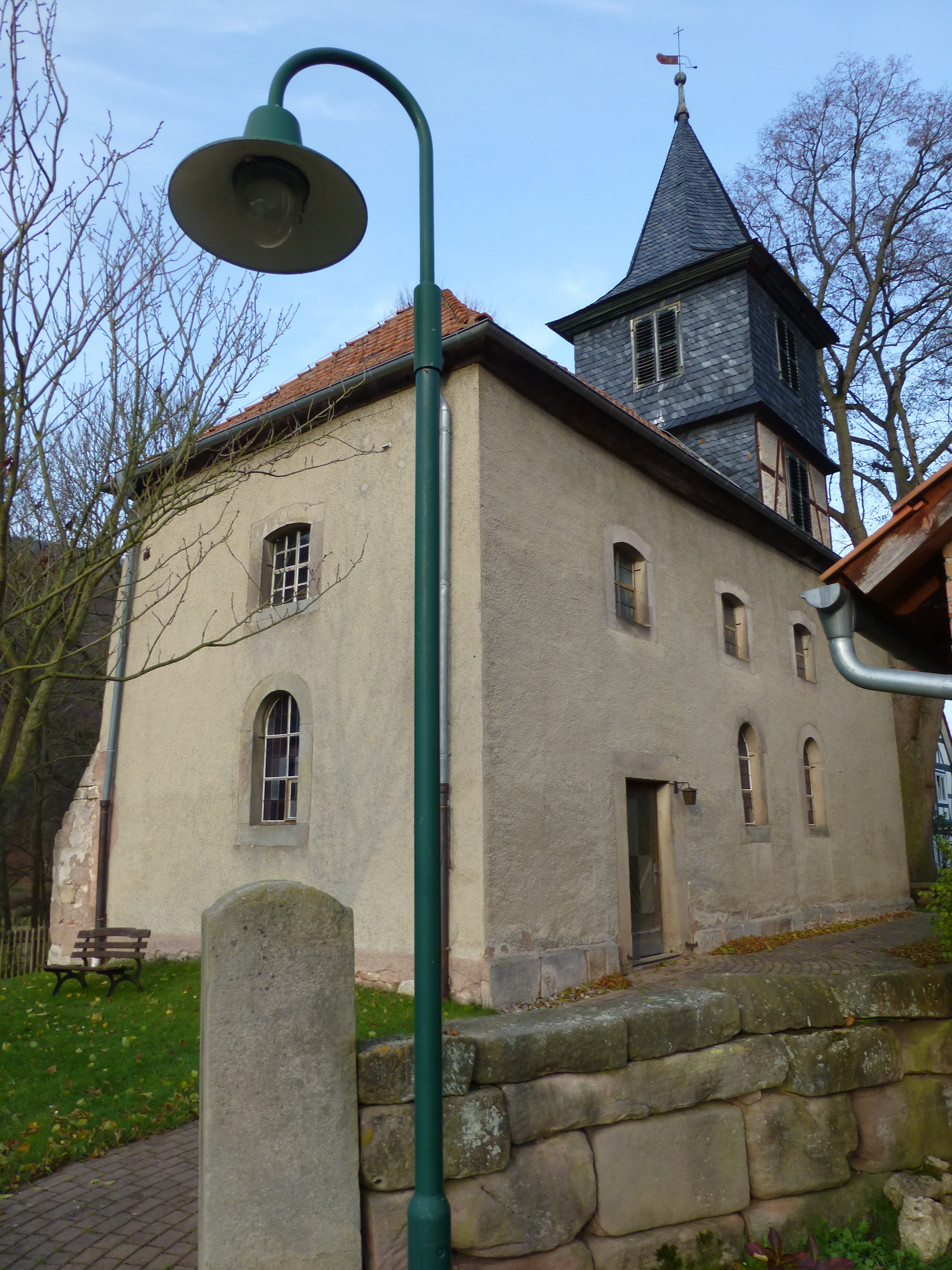 St. Nikolaikirche in Dietzenrode